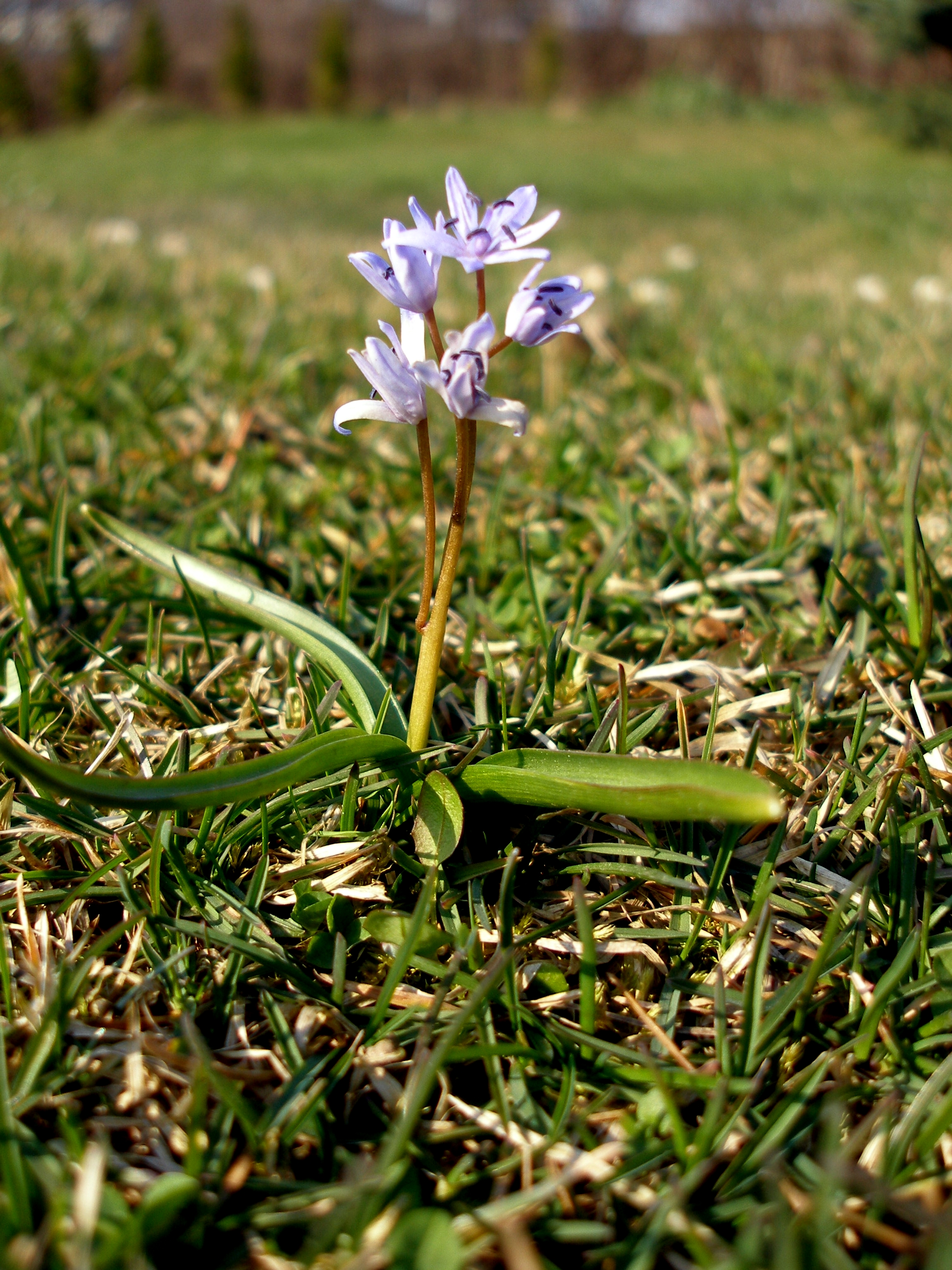 Scila dvojlistá (Scilla bifolia) variabilná cibuľkovitá trvalka. Z jednej cibuľky vyrastá len jediná tenká oblá byľ vysoká 10 až 40 cm. Prízemné čiarkovité listy sú obyčajne dva a majú tvar kapucne.Kvety rastú v chocholíku často bez listeňov. Patrí medzi jarné ozdoby vlhkých lúk, lesov a krovín. Kvitne v marci až apríli. Vyskytuje sa najmä v nížinách, zriedkavo v horských oblastiach. (kolekt. autor. Z našej prírody 1984) Foto z obce Sedlice, okres Prešov, región Šariš - ide asi o raritu lebo namiesto 2 samostatných rastliniek vyrástla iba jedna, dvojitá (dvojča).